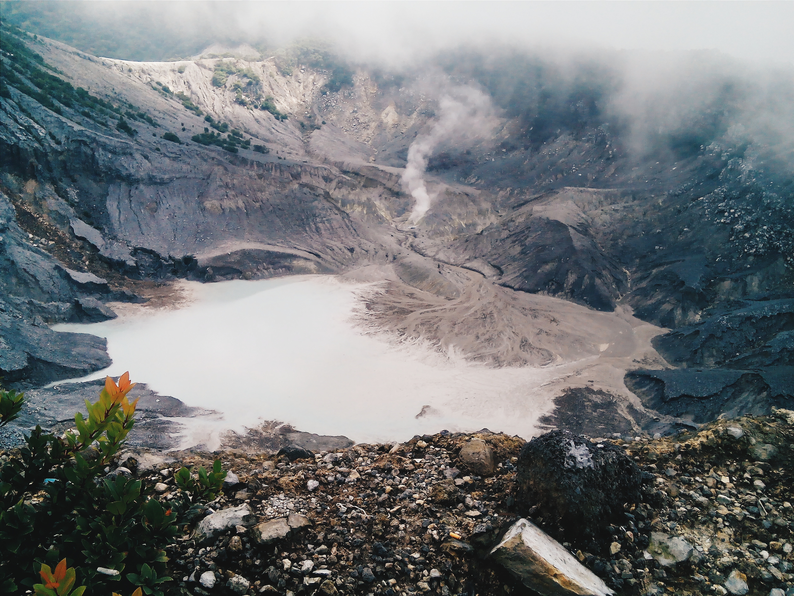 Tangkuban Parahu adalah salah satu destinasi wisata terkenal di Bandung. pemandangannya sangat indah dan udaranya sangat sejuk.